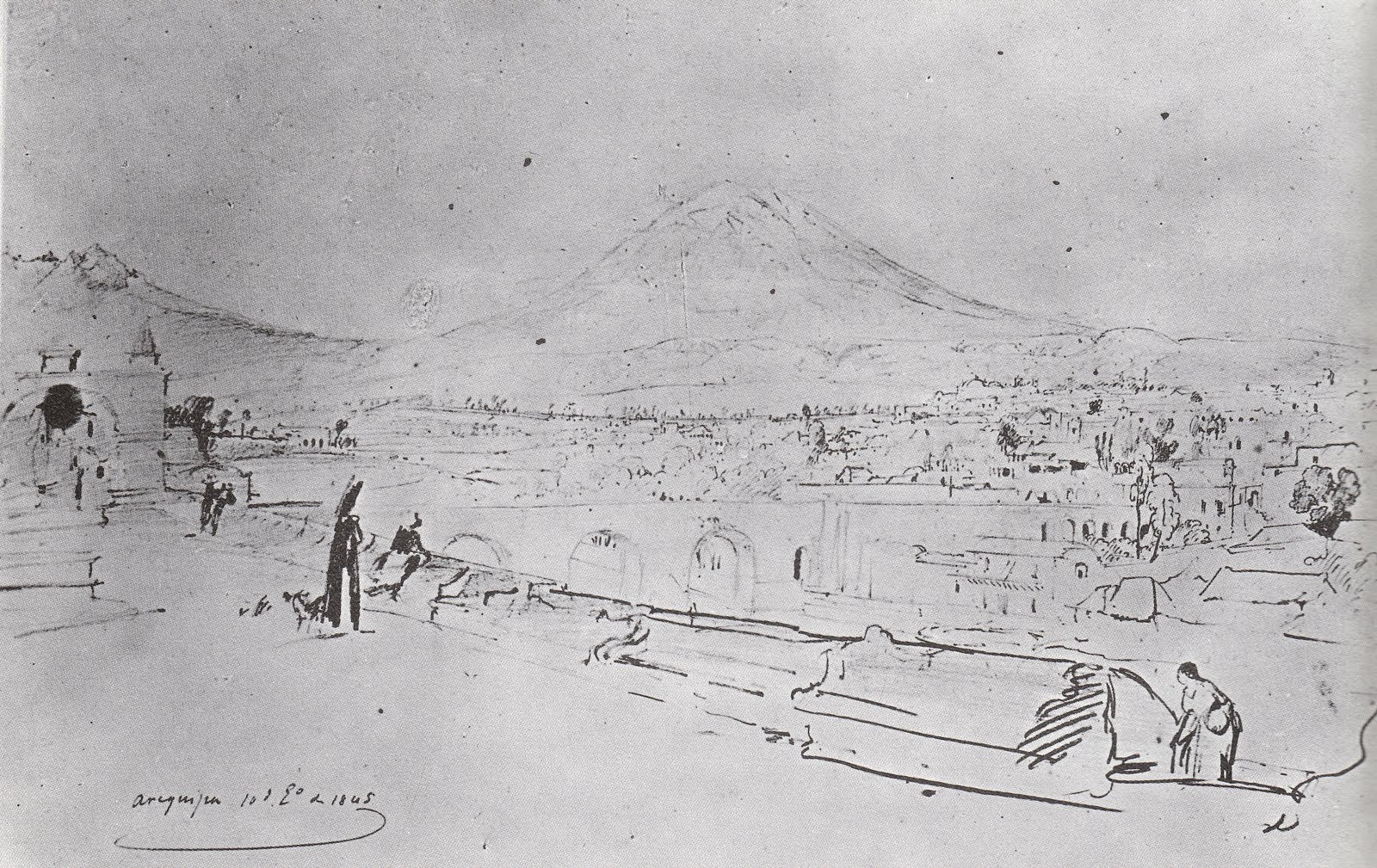 Ciudad de Arequipa, 10 de enero de 1845